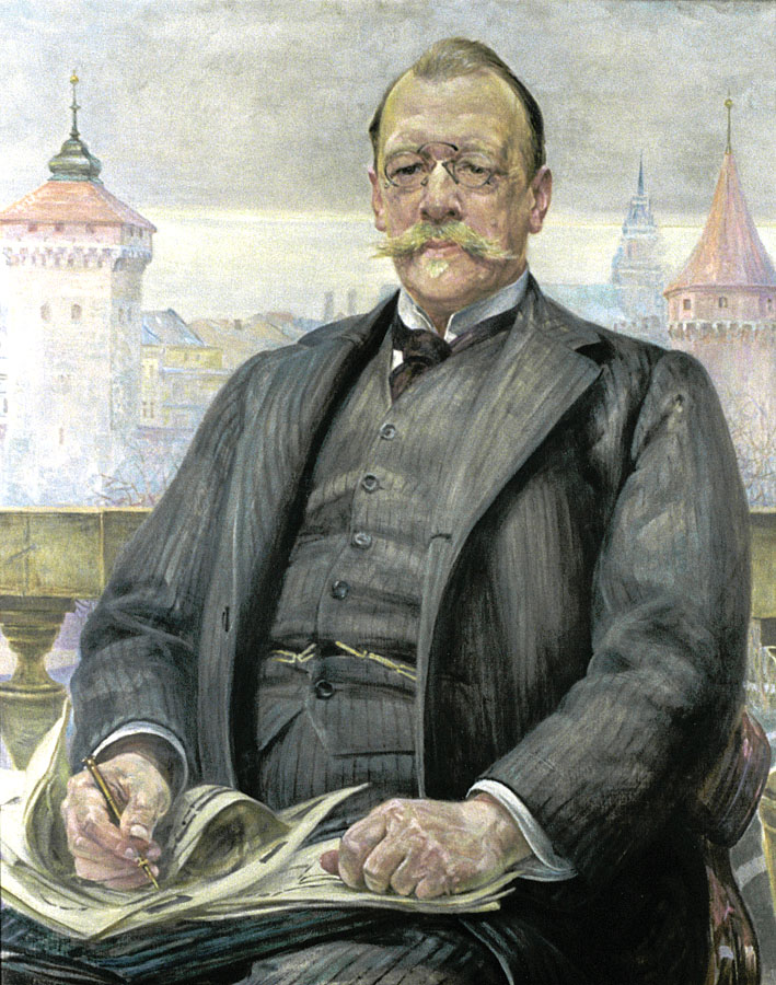 KU UCZCZENIU NIESPOŻYTYCH ZASŁUG STANISŁAWA TOMKOWICZA OKOŁO OCHRONY OJCZYSTYCH ZABYTKÓW PORTRET TEN, KONSERWATOROWIE I PRZYJACIELE, MUZEUM NARODOWEMU W DARZE ZŁOŻYLI. 8. II. 1913, autor Jacek Malczewski, olej na płótnie, dar Grona Konserwatorów Galicji Zachodniej